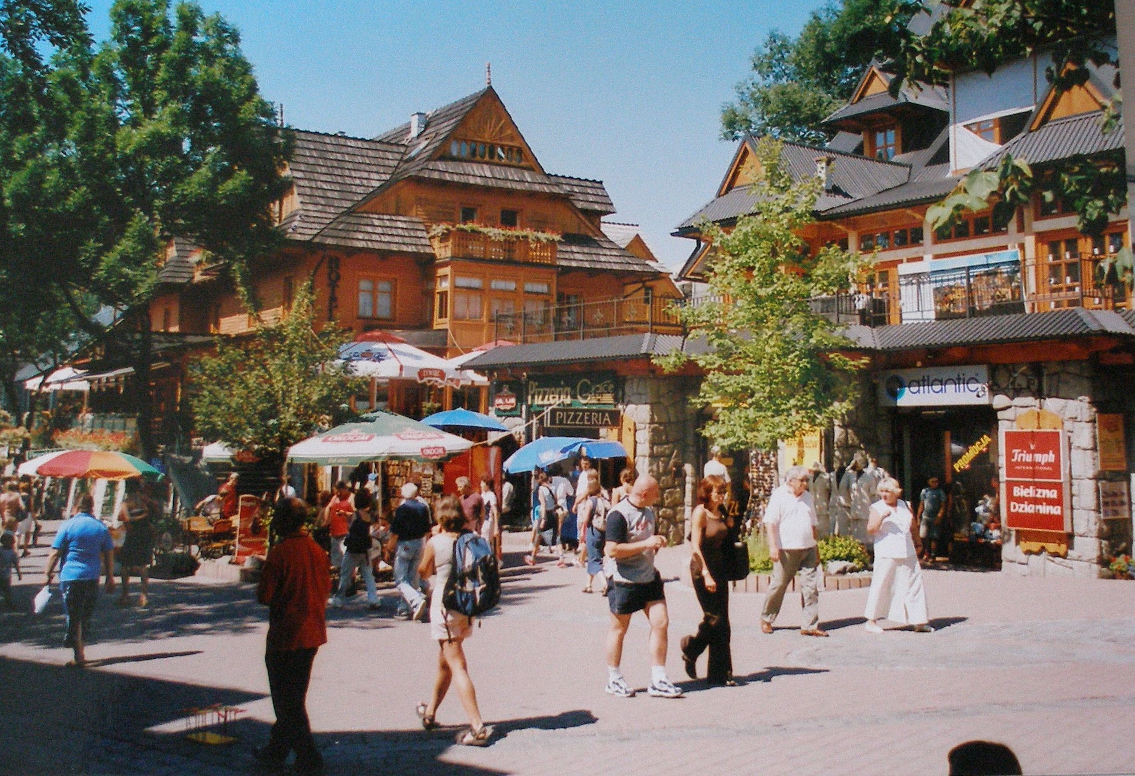 Poľské mesto Zakopané pešia zóna Krupówki